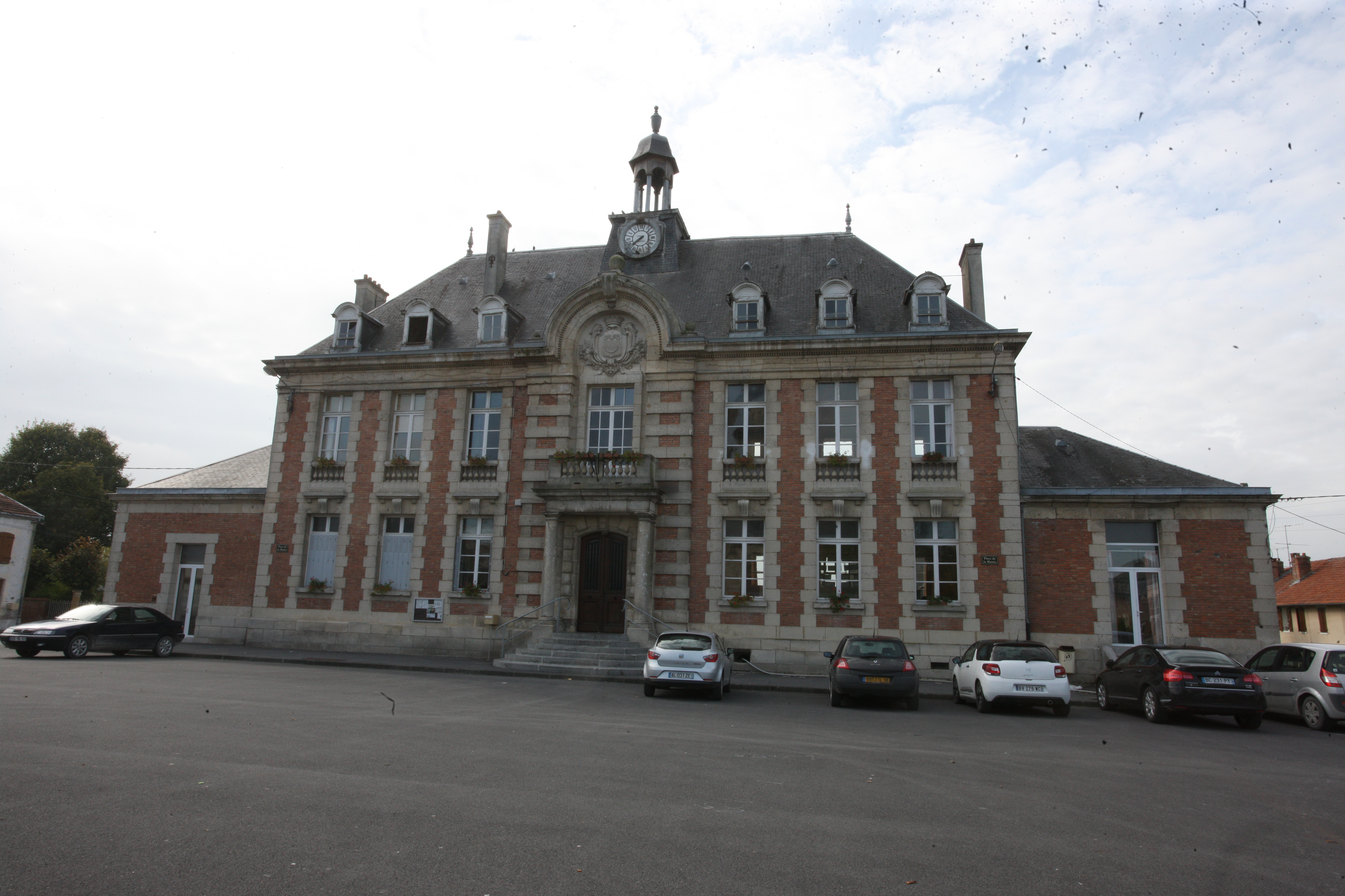 Village Ardennais